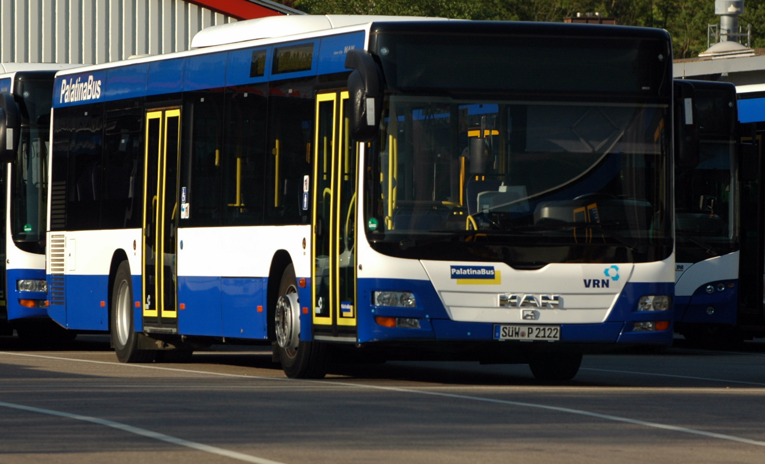 Waibstadt - PalatinaBus - MAN Lion's City M - SÜW-P 2122